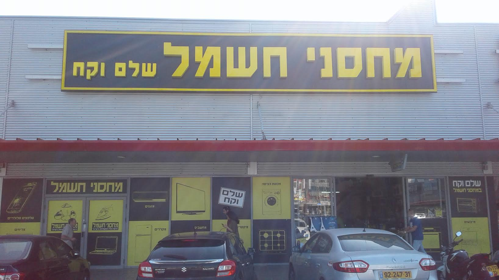 סניף מחסני חשמל, ביג קריות